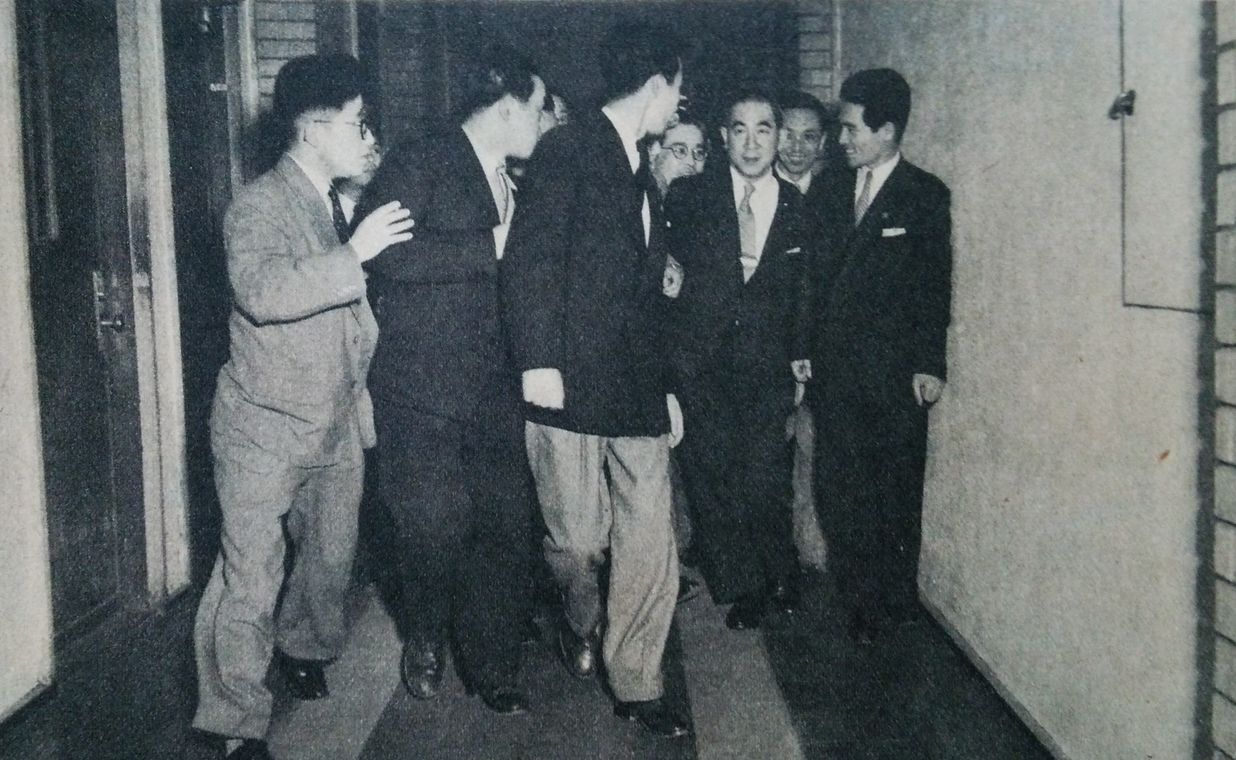 造船疑獄にて指揮権発動の後、辞表を提出するために首相官邸を訪れた犬養健法相